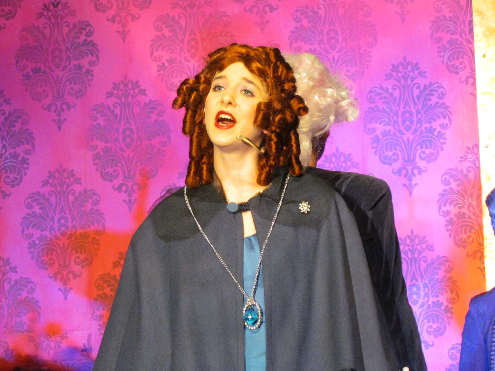 Mademoiselle de Scuderi beim Bittgesuch um Gnade für Olivier